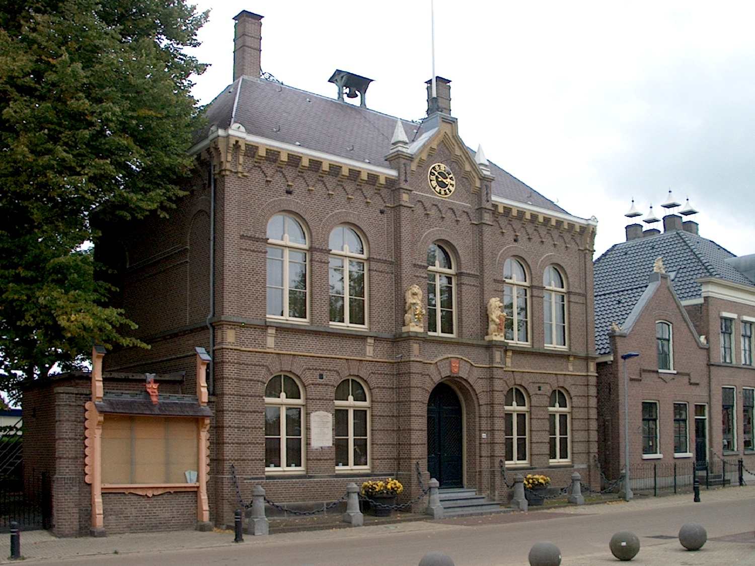 Obdam, Nederland: voormalig gemeentehuis.